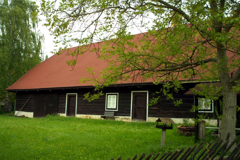 Bývalá hájovna Třebekov (k. ú. Jarov).